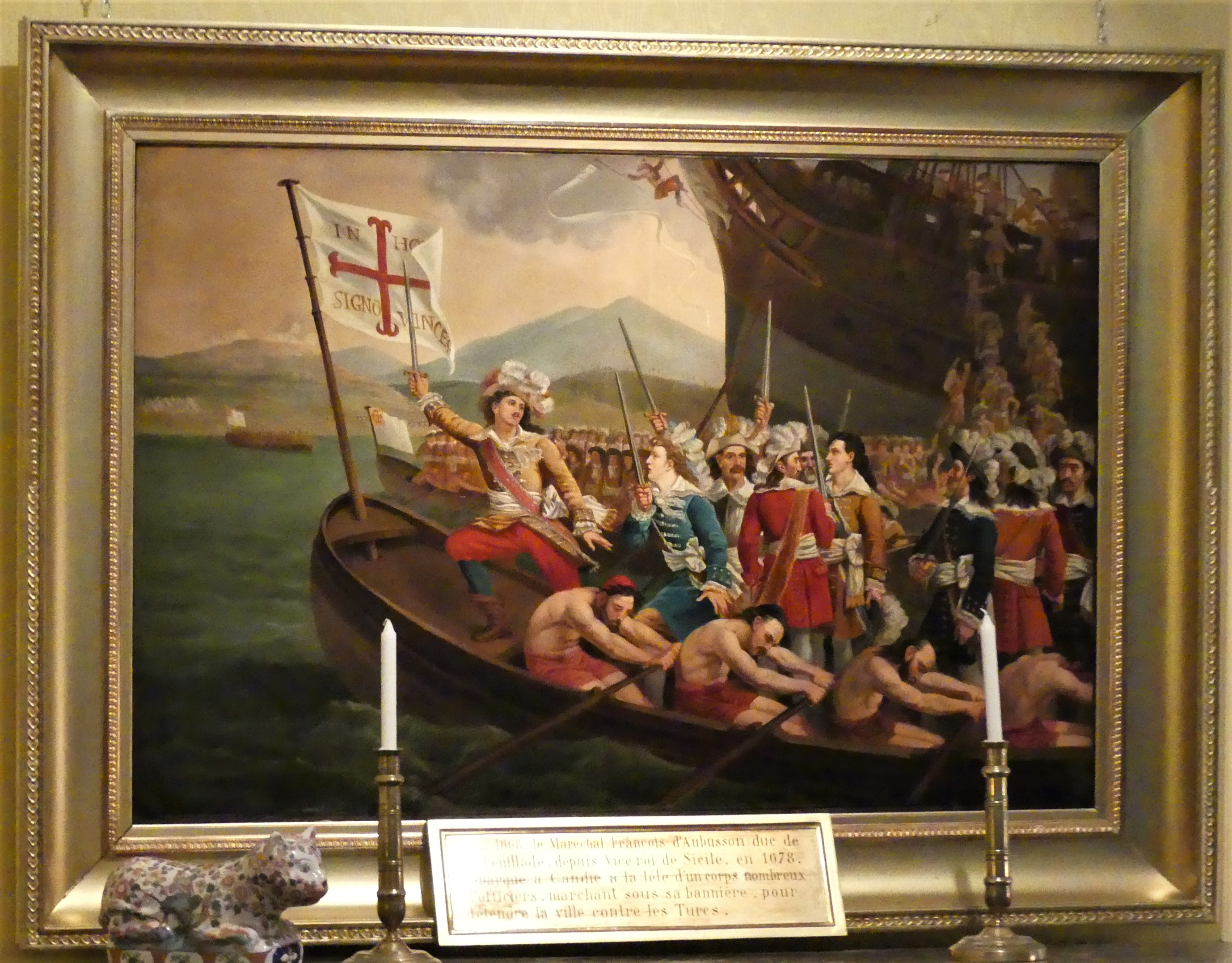 Tableau représentant le débarquement de 1668 à Candie par François d'Aubusson, château de Villemonteix, Saint-Pardoux-les-Cards, Creuse, France.